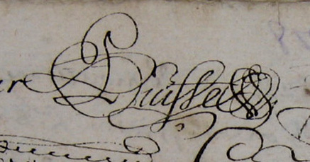 Signature de Pierre Puiffe, notaire royal